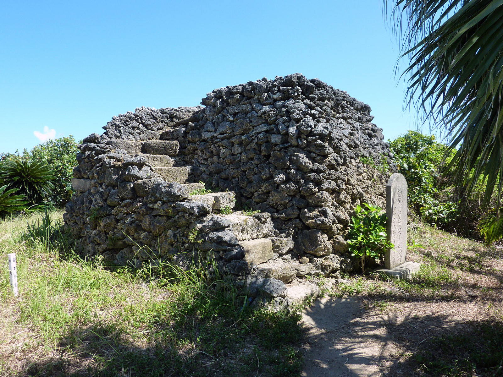 鳩間中森（沖縄県八重山郡竹富町鳩間島）